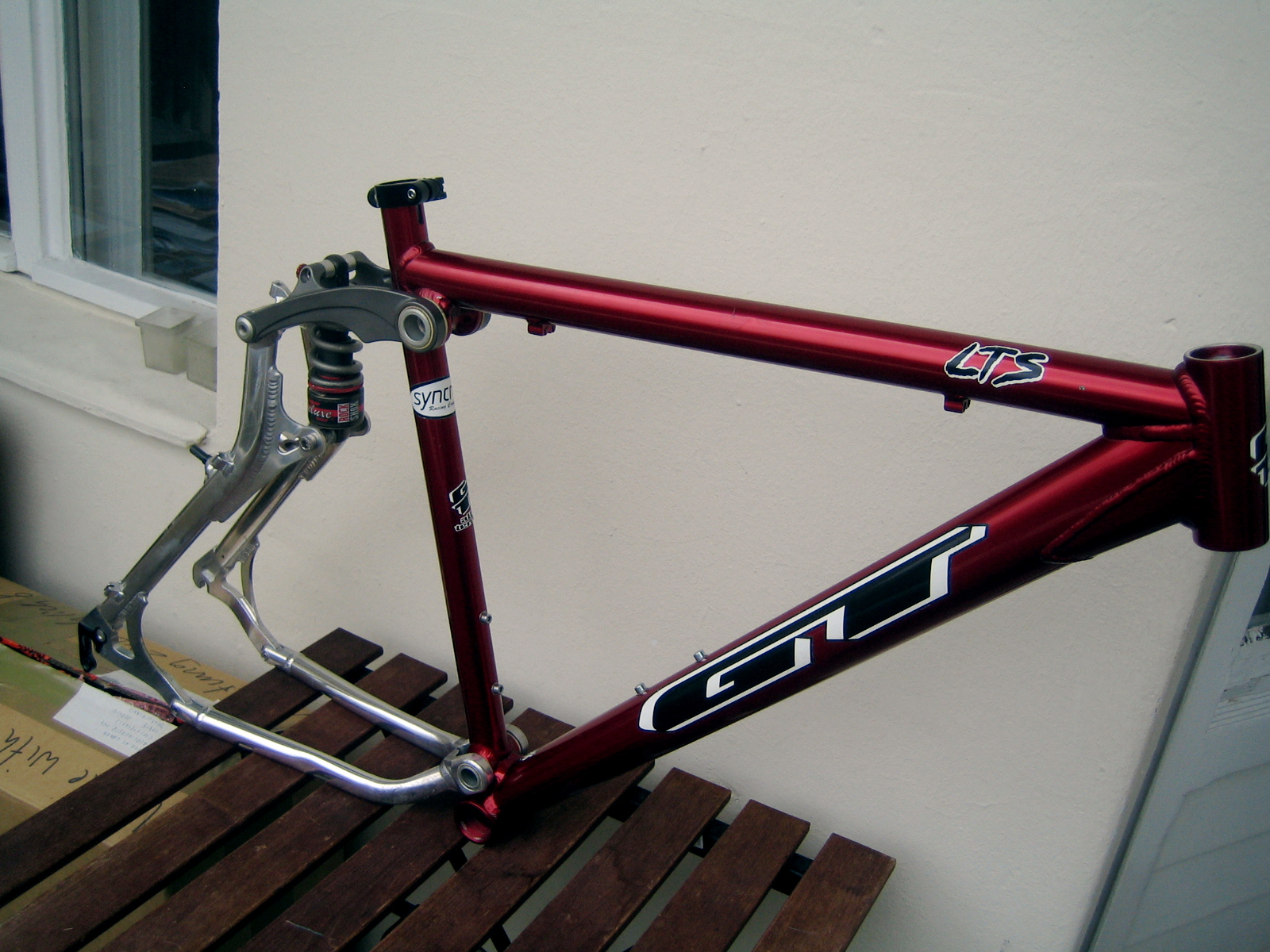 GT LTS Rahmen von 1996